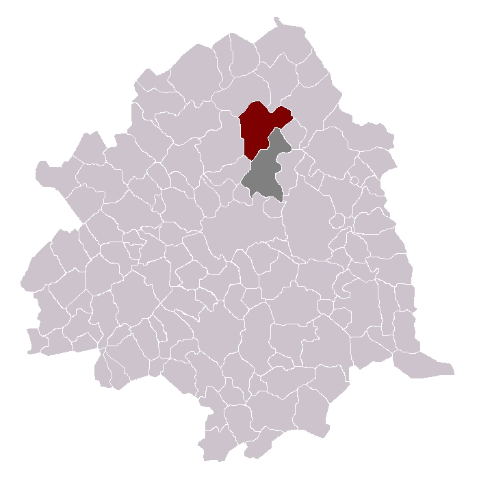 Bondues dans son canton et son arrondissement